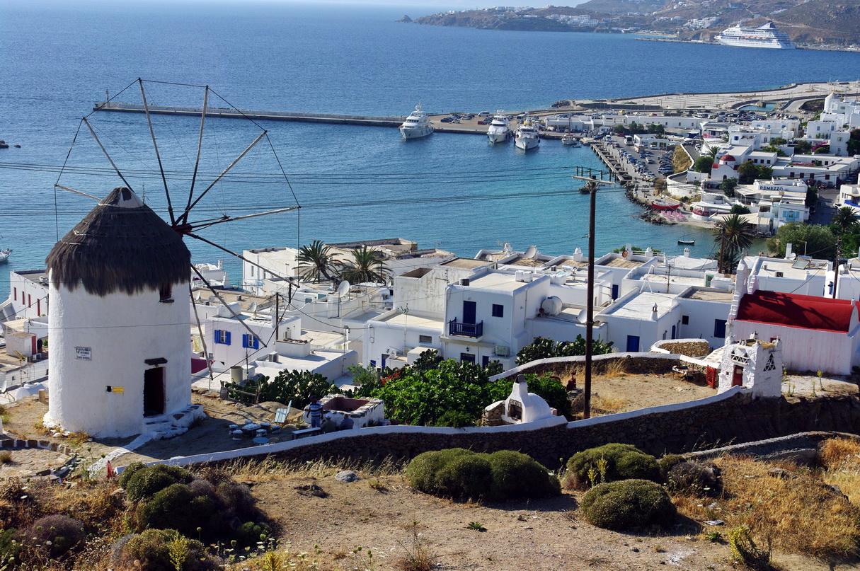 Blick auf die Stadt Mykonos